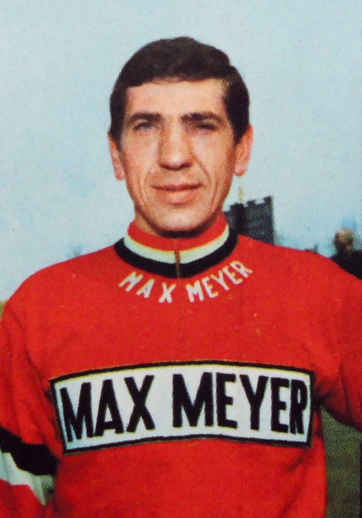 Figurina CAMPIONI DELLO SPORT 1969/70-n.207-MICHELOTTO (ITA)-CICLISMO-rec